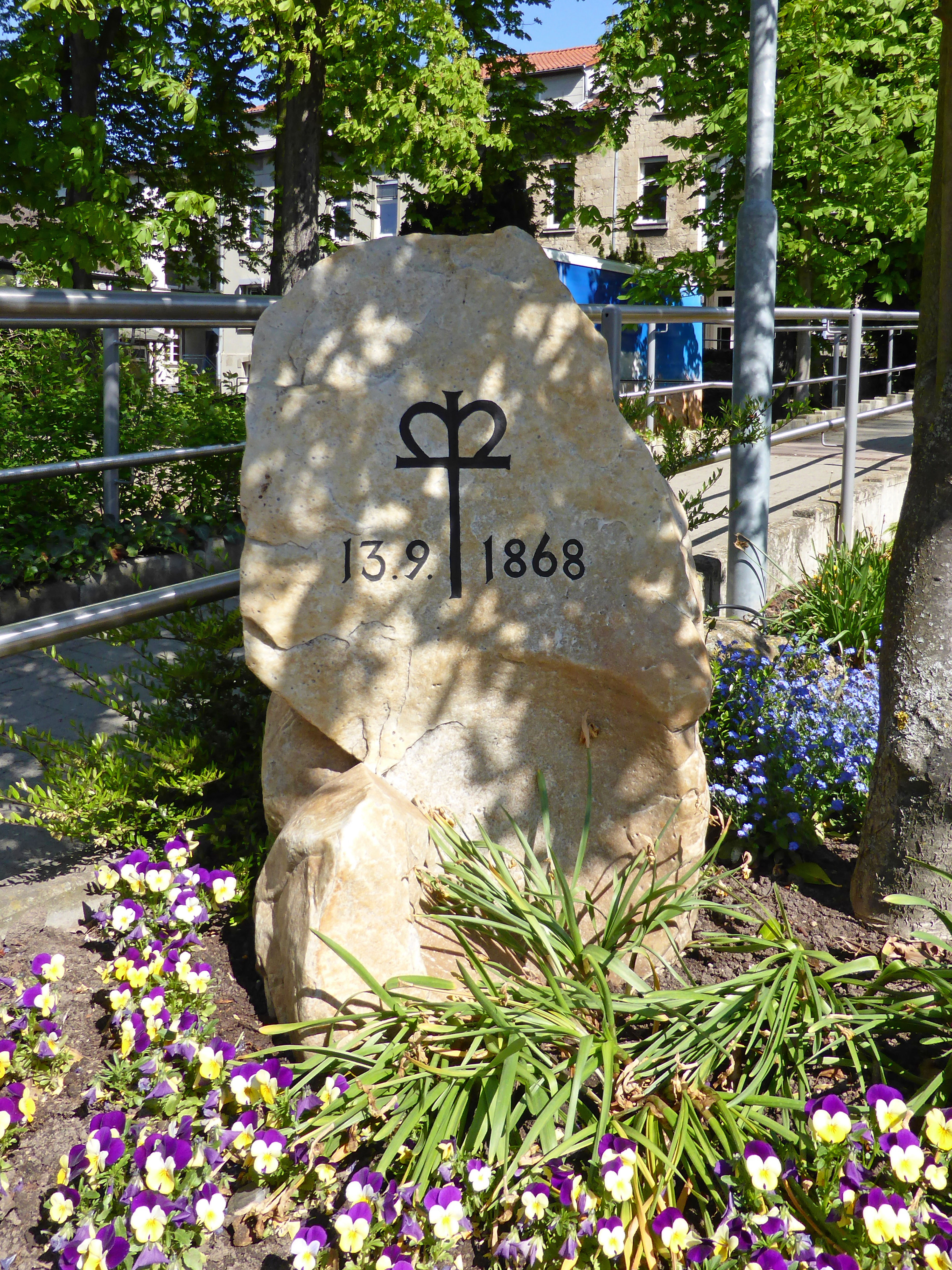 Gedenkstein an die Gründung von Neuerkerode.